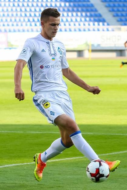 Володимир Шепелєв - український футболіст